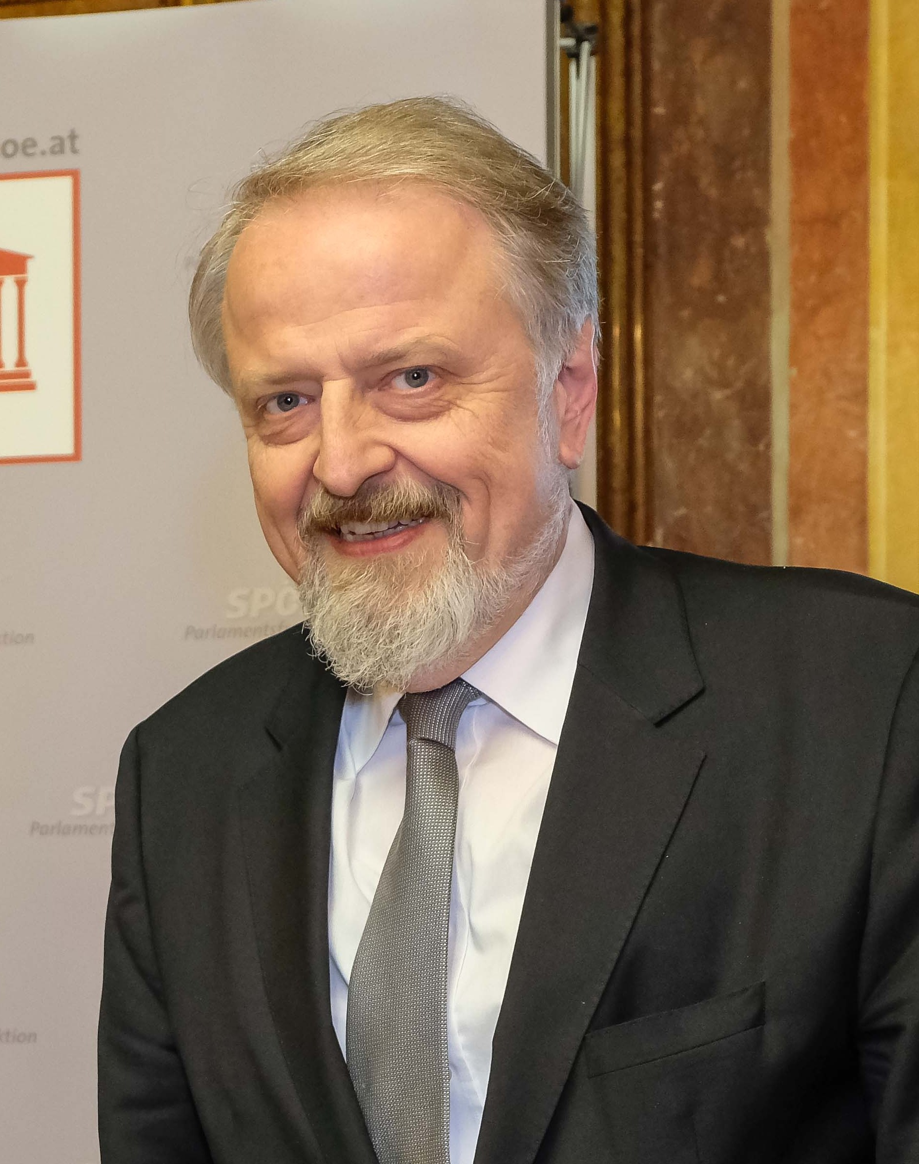 Foto: Walter Henisch Verleihung des Bruno-Kreisky-Preis für das Politische Buch 2015